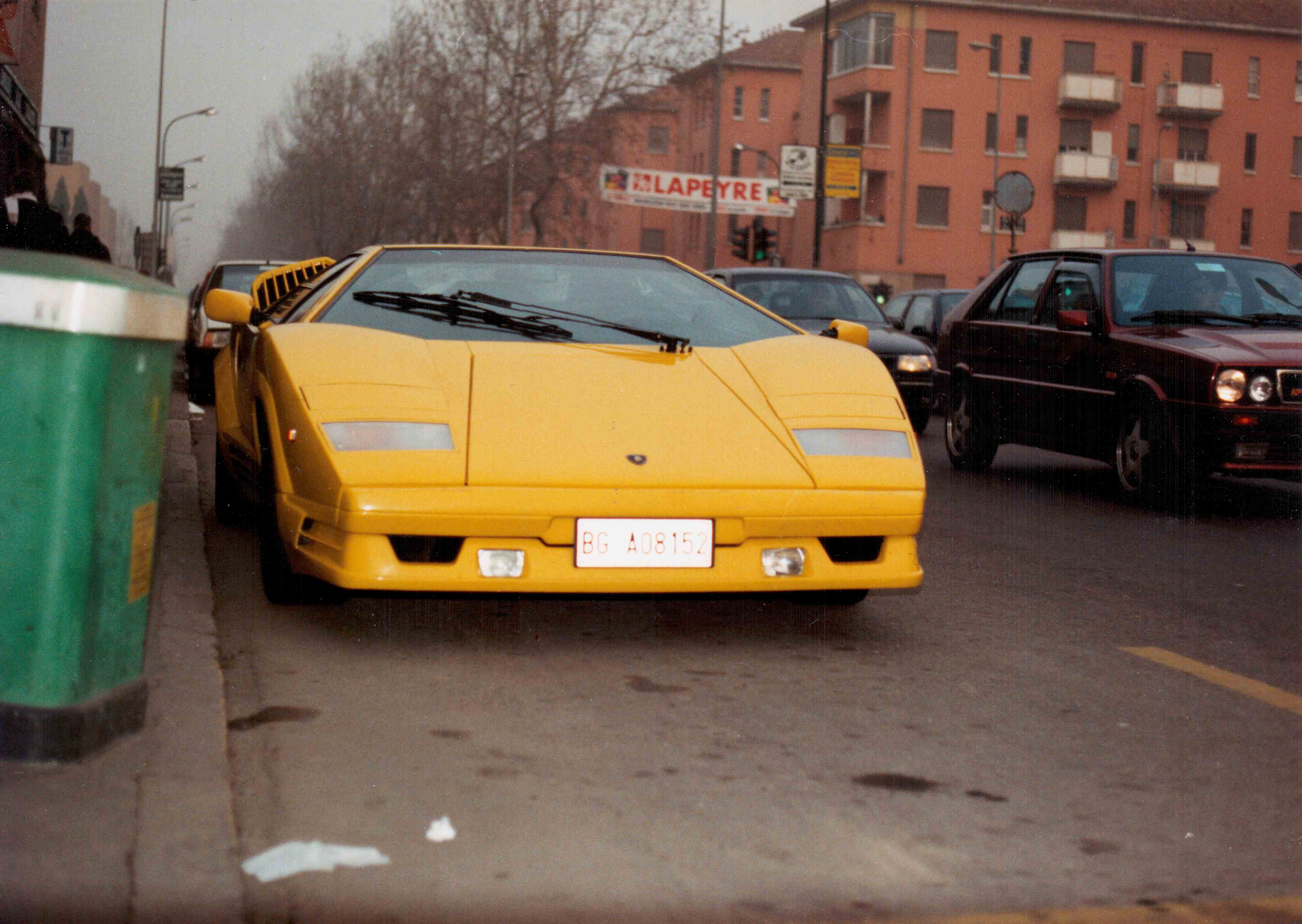 autovettura Lamborghini in sosta a Milano